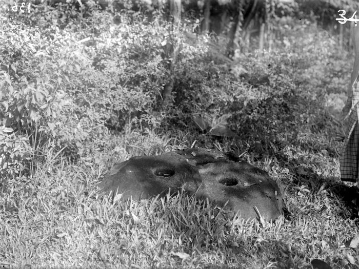 Negatief. Megalitische vijzel in Padjarboelan